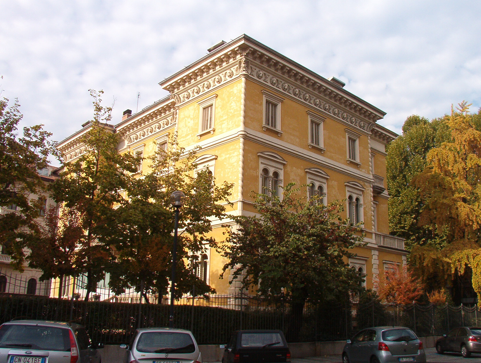 Casa tipica - Quartiere Crocetta - Torino - Italy